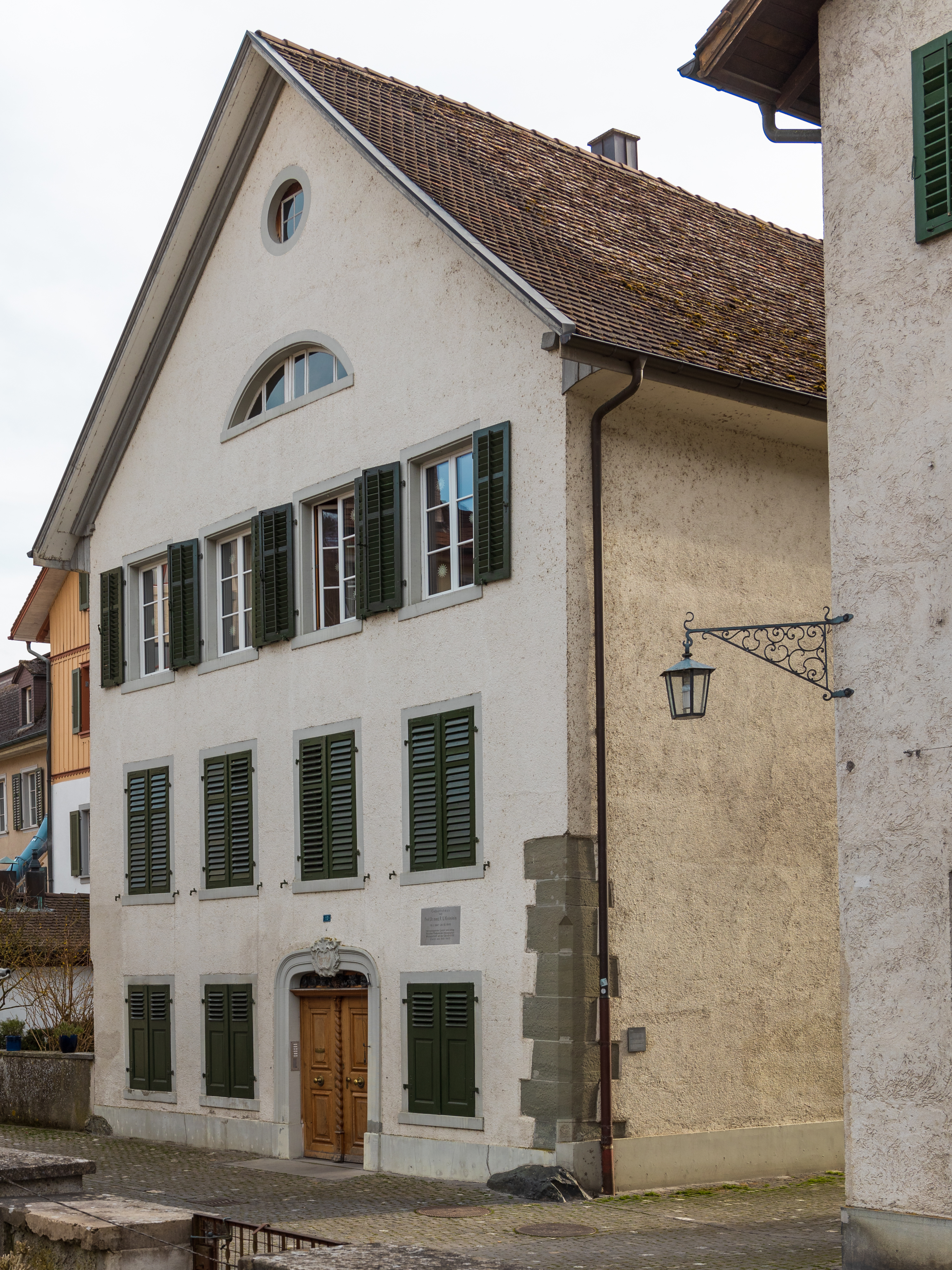 Stein am Rhein, Undergass 13. Geburtshaus des Mediziners Prof. Dr. med. Rudolf Ulrich Krönlein.